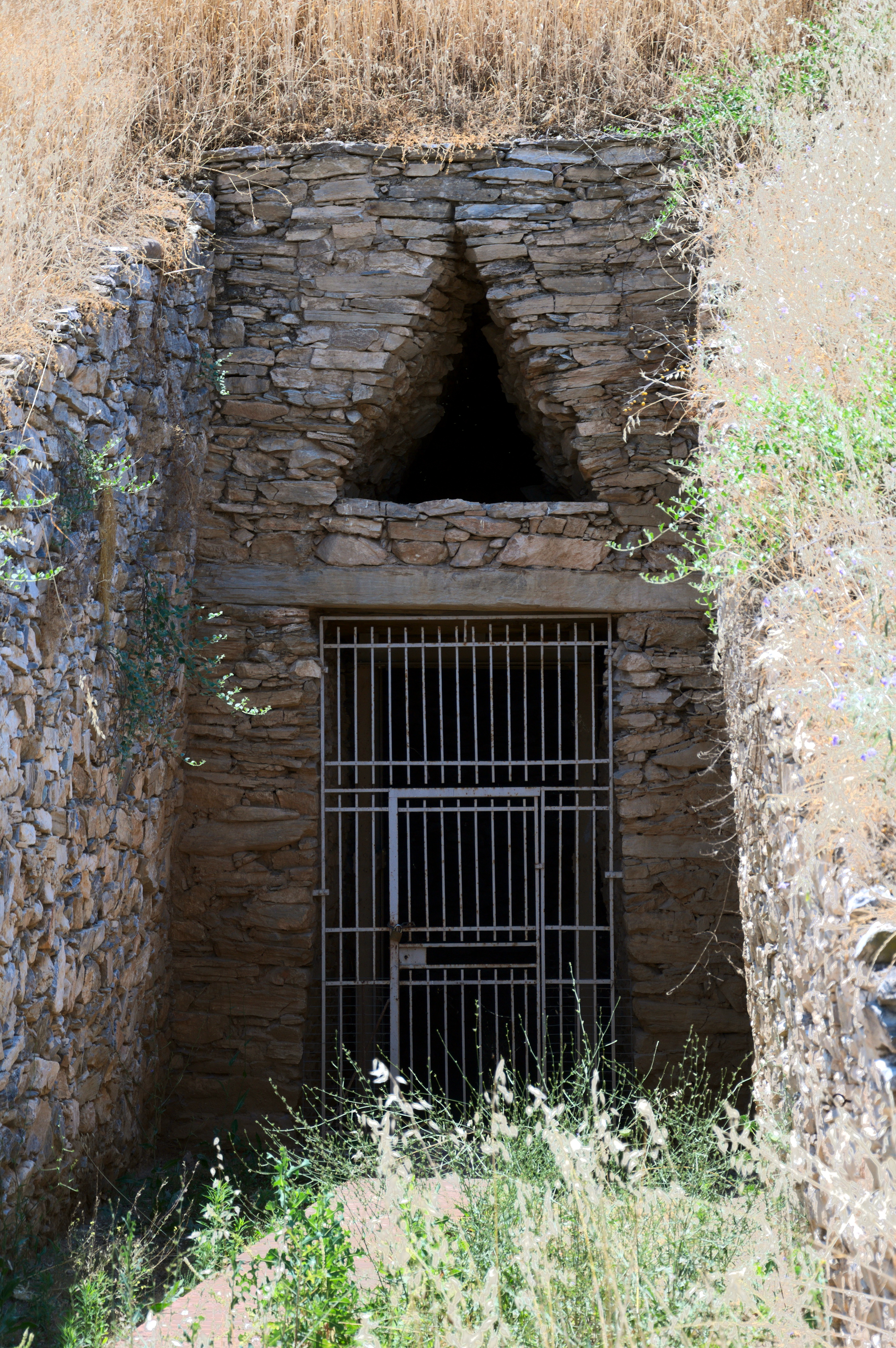 Θολωτός τάφος Λαμιόσπιτο Διμηνίου«Θολωτός τάφος Λαμιόσπιτο Διμηνίου»